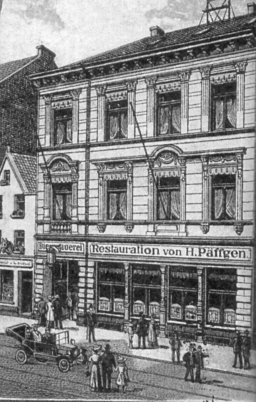 Brauhaus Päffgen in Köln, historischer Ausschnitt aus einer Postkarte